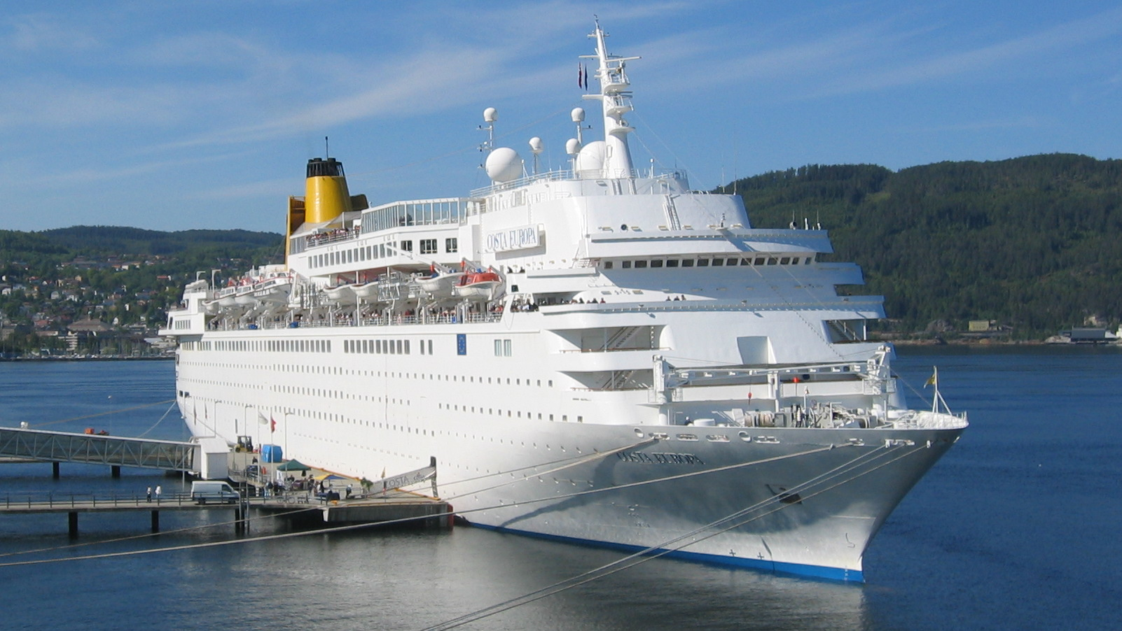 Costa Europa